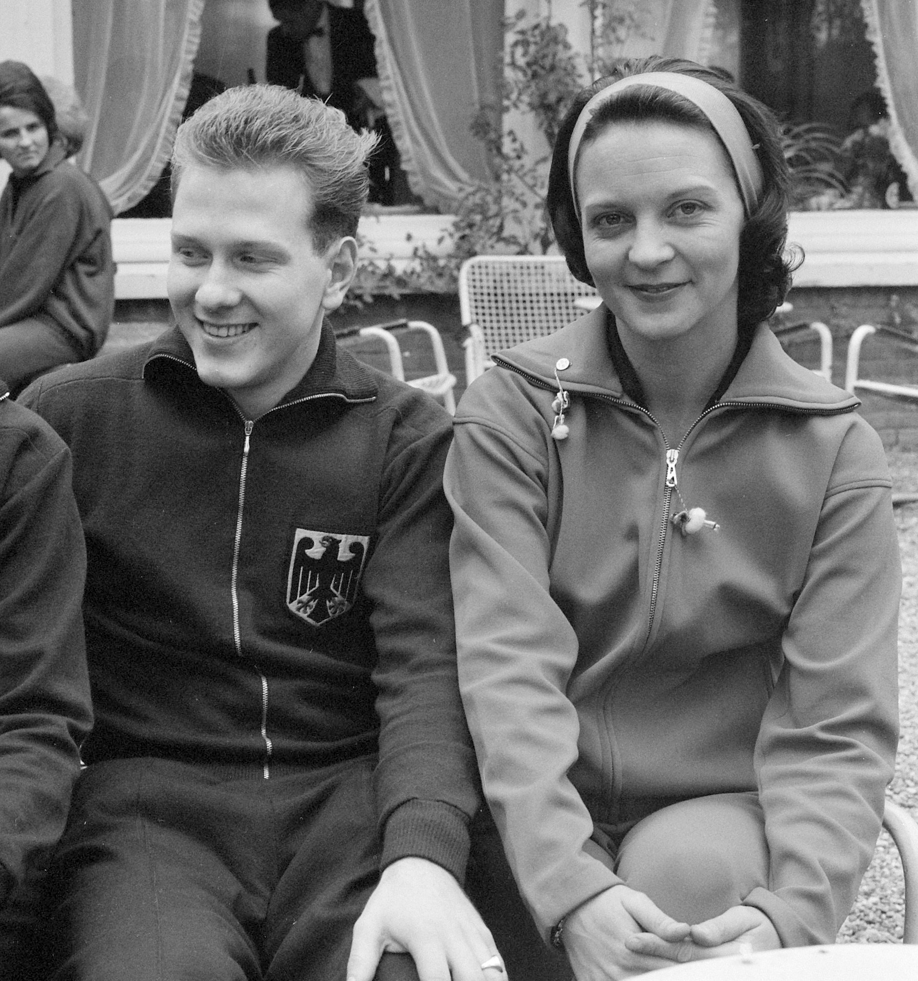 Internationale Tafeltenniskampioenschappen 1962, in Krelagehuis te Haarlem, v.l.n.r. Scholer (Dld) en Rowe (Eng)